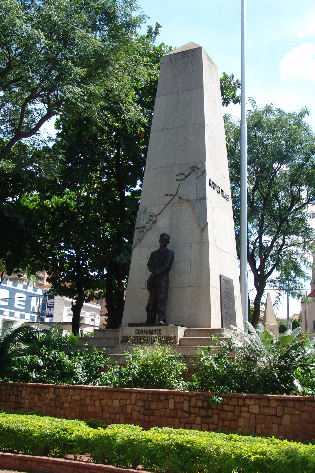 Foto do município de Jaú, São Paulo, Brasil